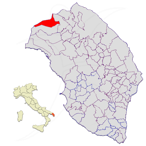 Il comune di Guagnano nella provincia di Lecce